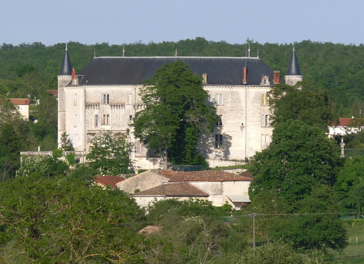 Château de la Rochandry, façade ouest, vue de la Pradillerie. Mouthiers, Charente, France